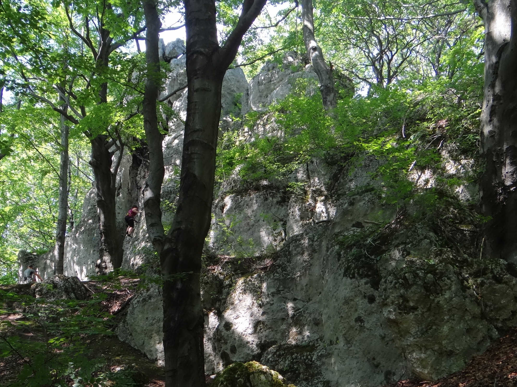 Czarny Kamień w Łutowcu